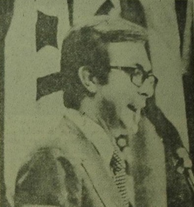 Jorge Vázquez en 1973, como subsecretario de relaciones exteriores de Cámpora.